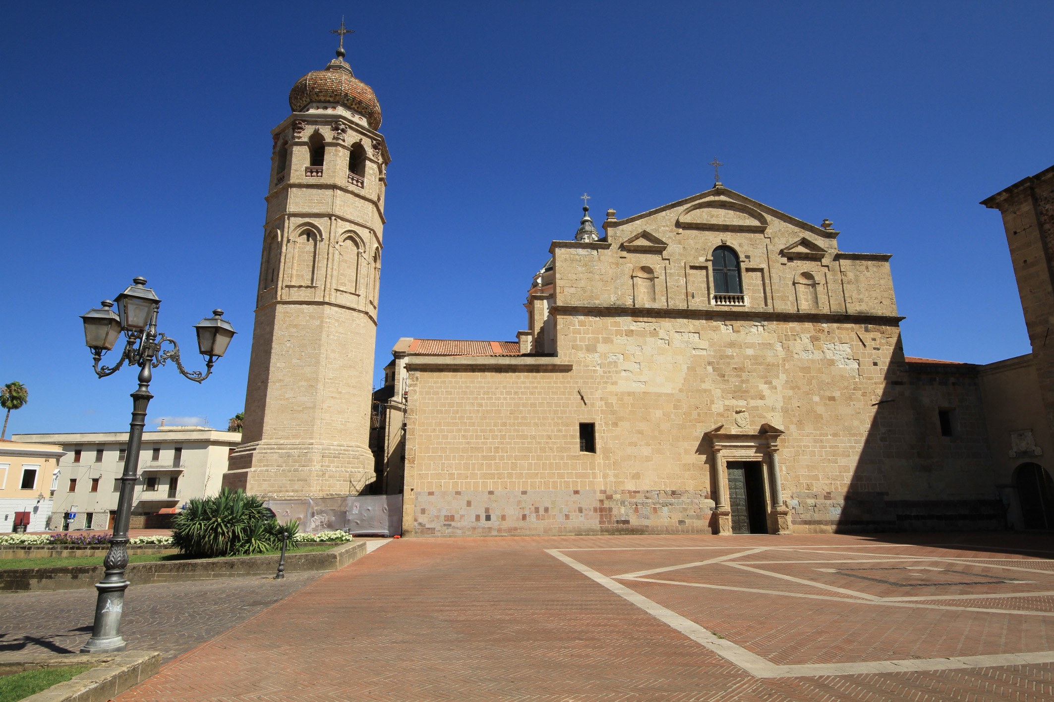 Il Duomo di Santa Maria Assunta, Oristano, Province of Oristano, Sardinia, Italy